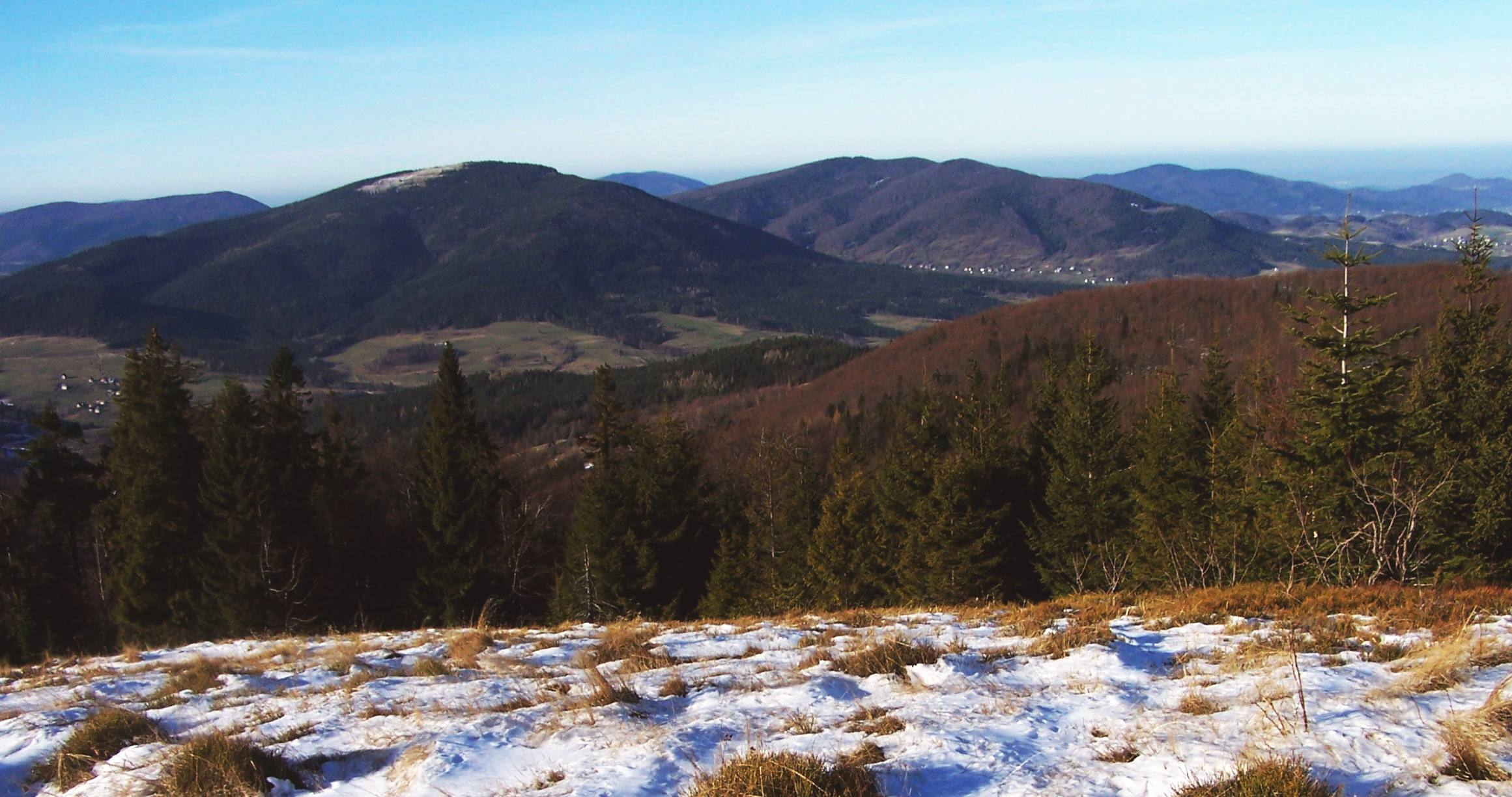 Ćwilin, Śnieżnica, Ciecień (Beskid Wyspowy)